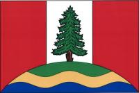 Nové Heřminovy, vlajka. List tvoří tři svislé pruhy, červený, bílý a červený. Z dolního okraje listu vyniká žlutým vlnitým pruhem dělené zeleno-modré návrší, z něhož do bílého pruhu vyrůstá zelený modřín s hnědým kmenem. Poměr šířky k délce listu je 2 : 3.